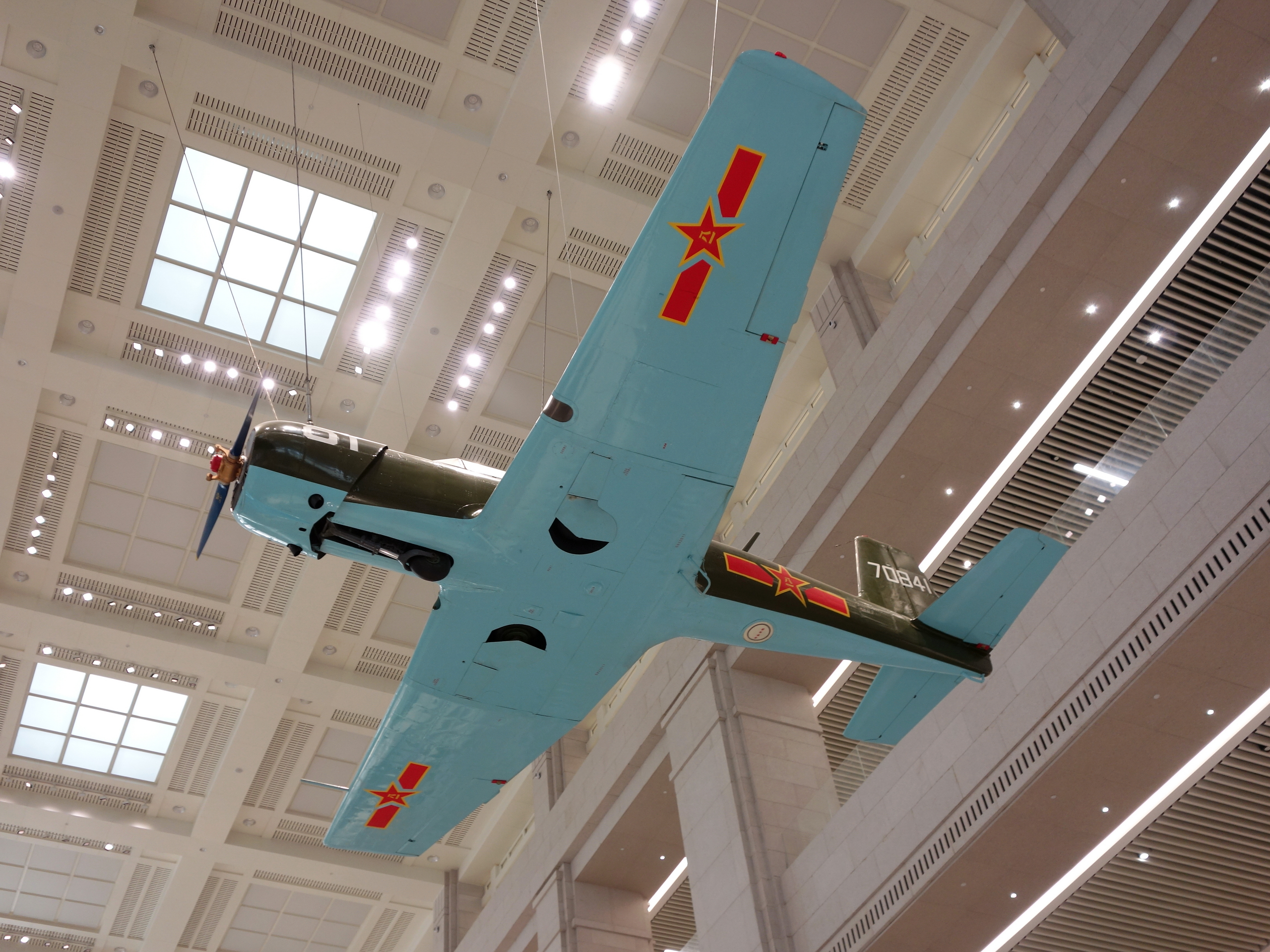 中国人民革命军事博物馆展出的初教-6初级教练机。